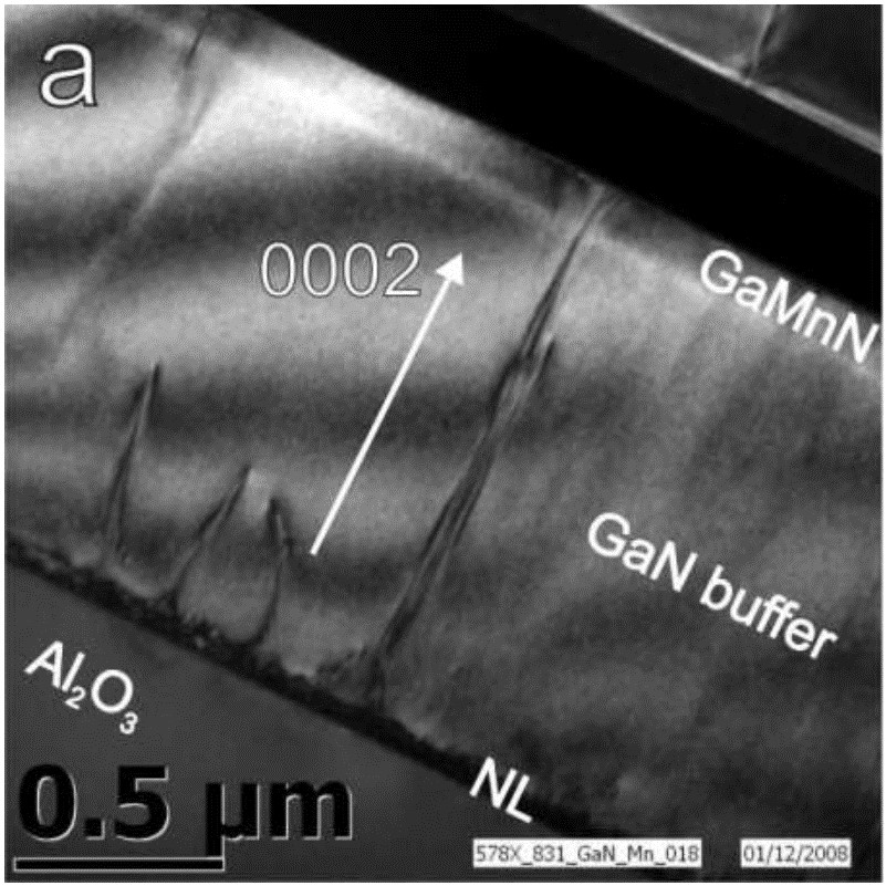 mergulhando o substrato em um agente corrosivo pode ser capaz de remover a superfície defeituosa e revelar os poços e linhas característicos de defeitos residuais